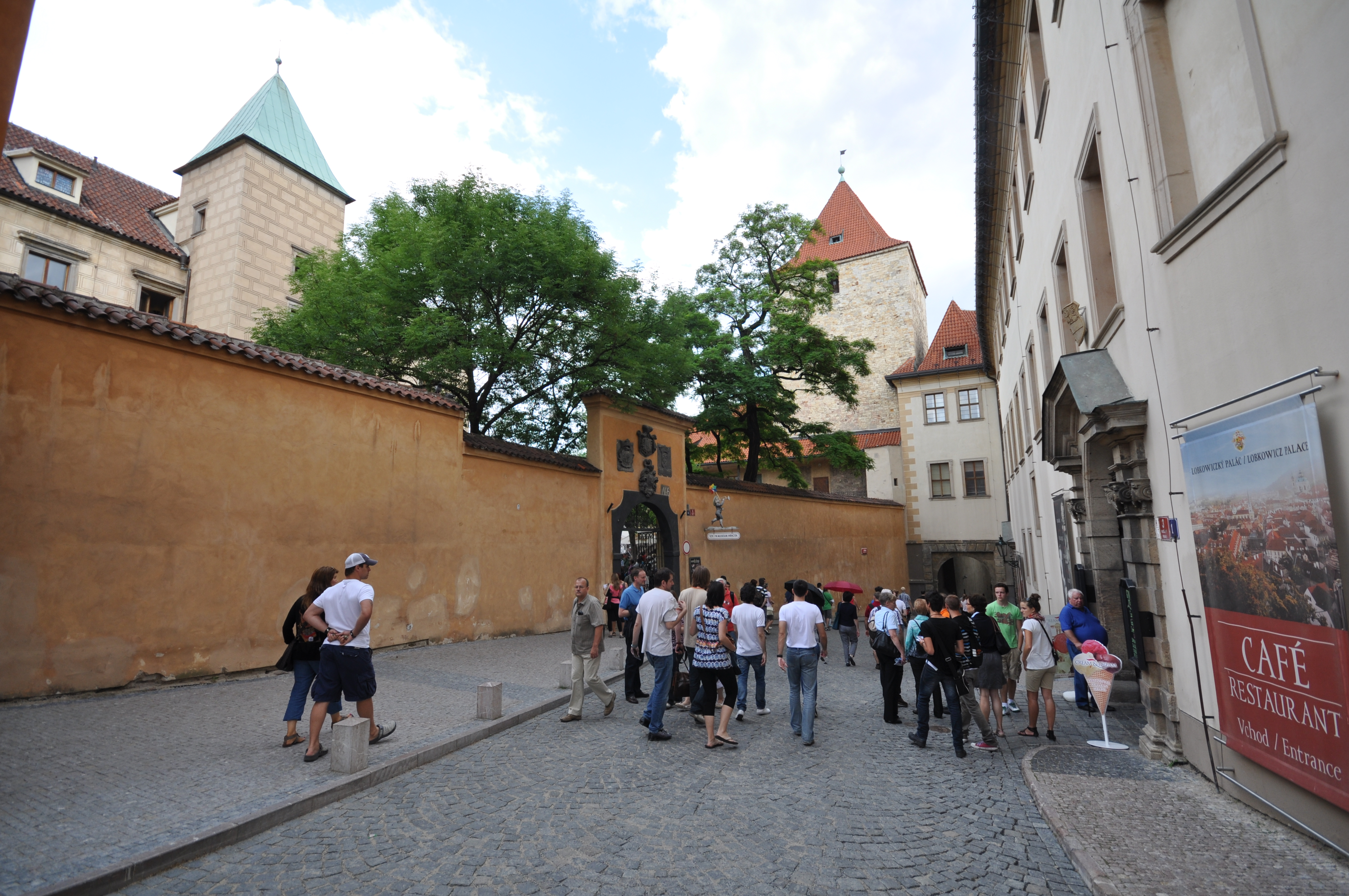 Prag